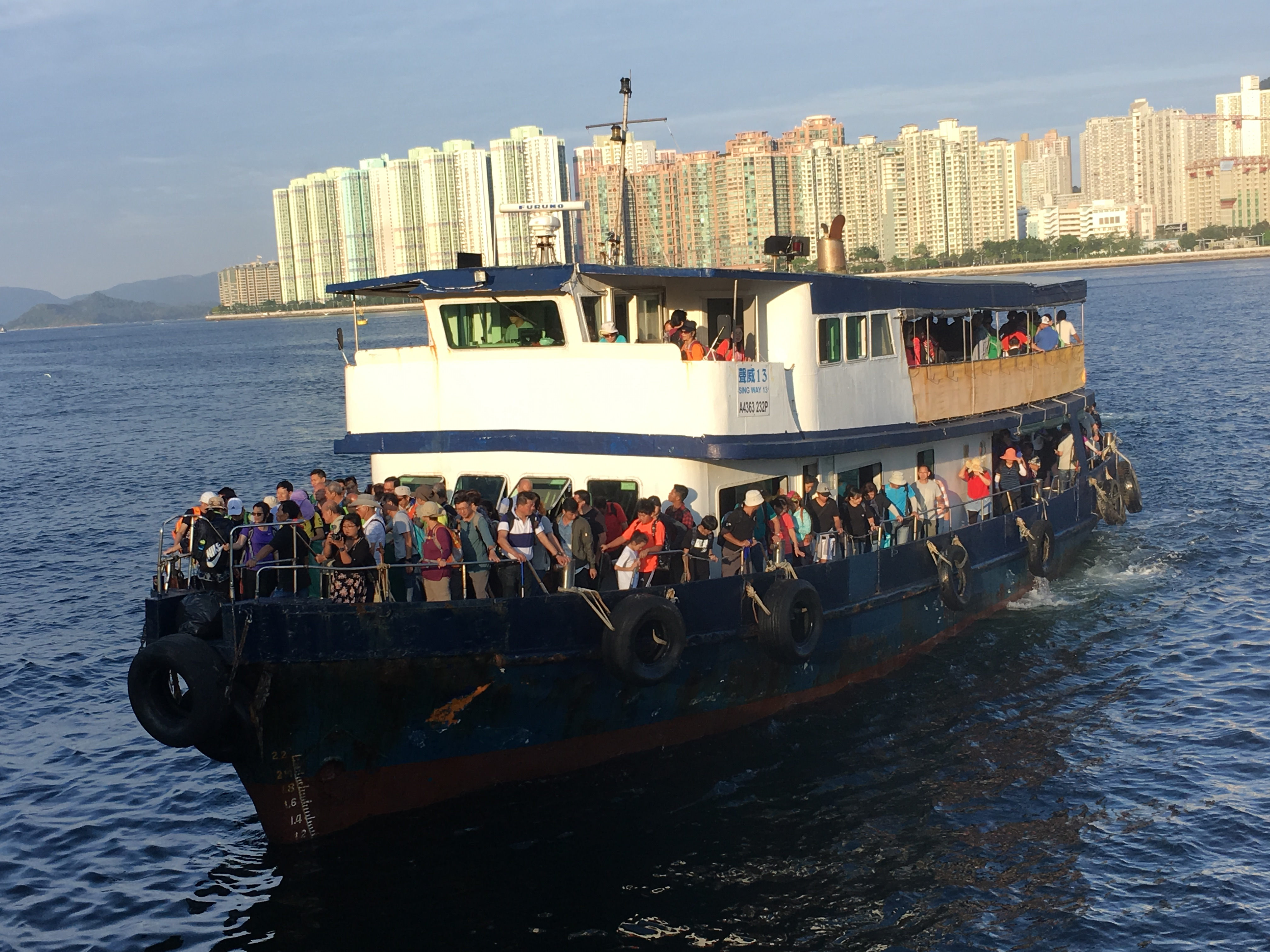 This photo is taken in Ma Liu Shui.